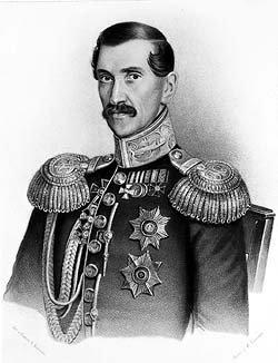 Граф Николай Александрович Протасов (1798 — 1855)